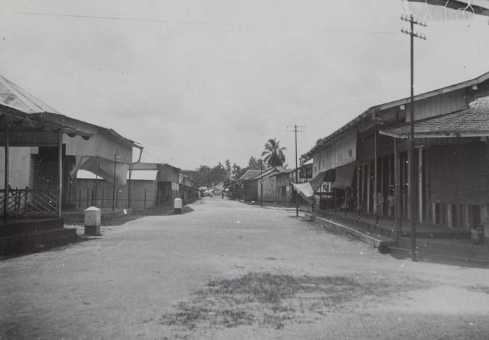 foto. Pasar Lama, Bandjermasin